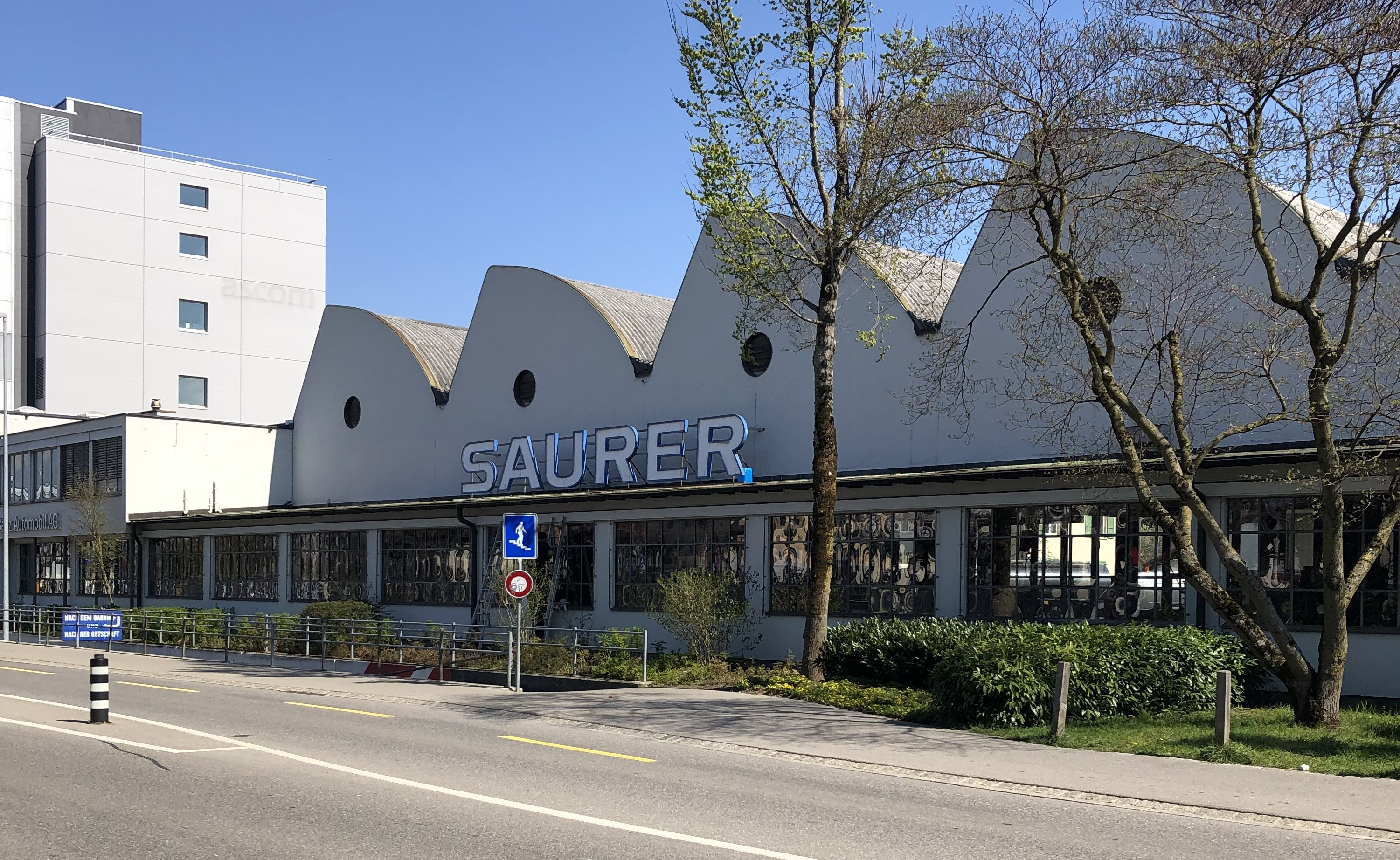 Saurer-Garage, heute Mercedes Bern Bümpliz